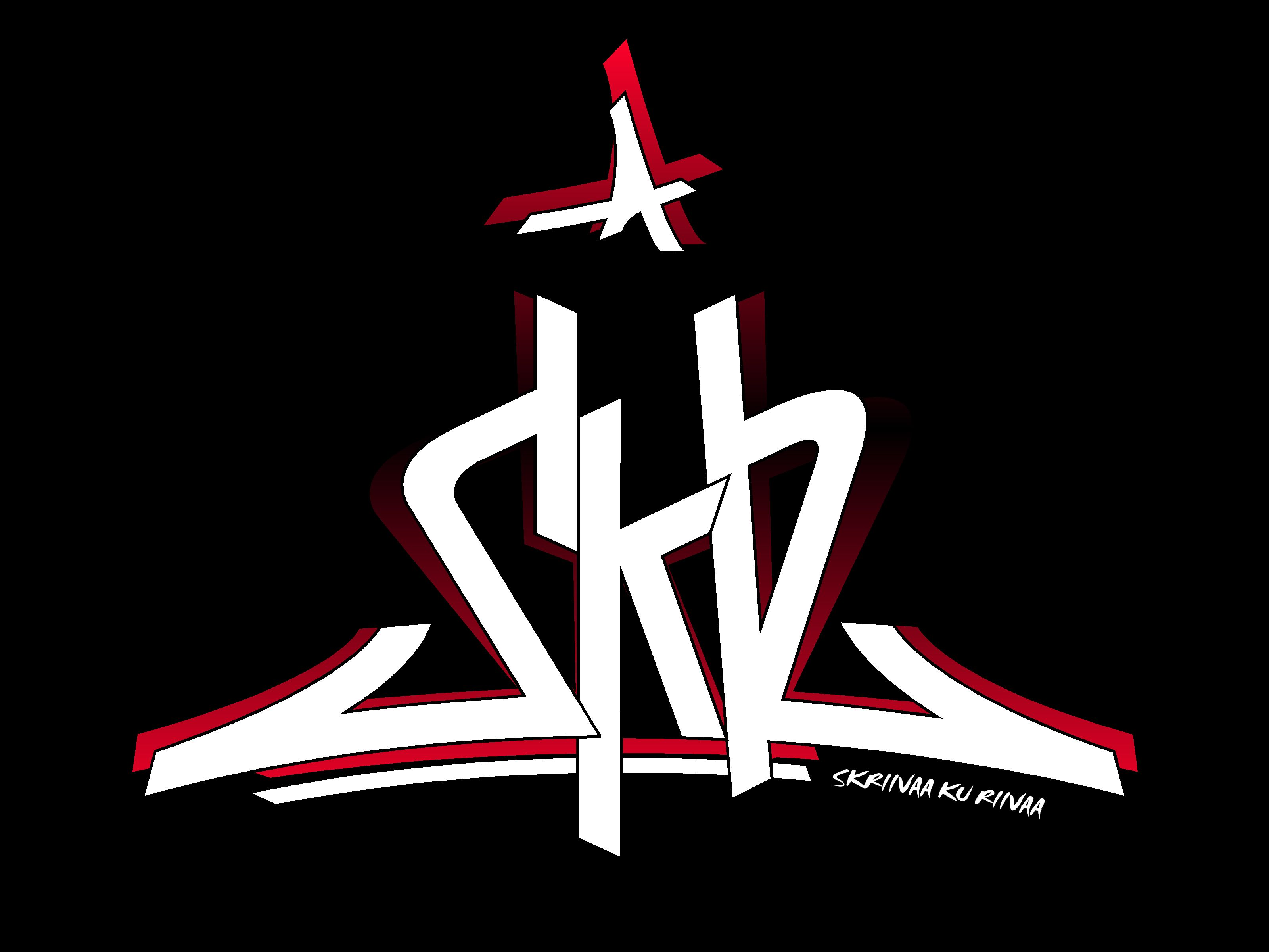 Skriivaa ku riivaa -liigan logo.